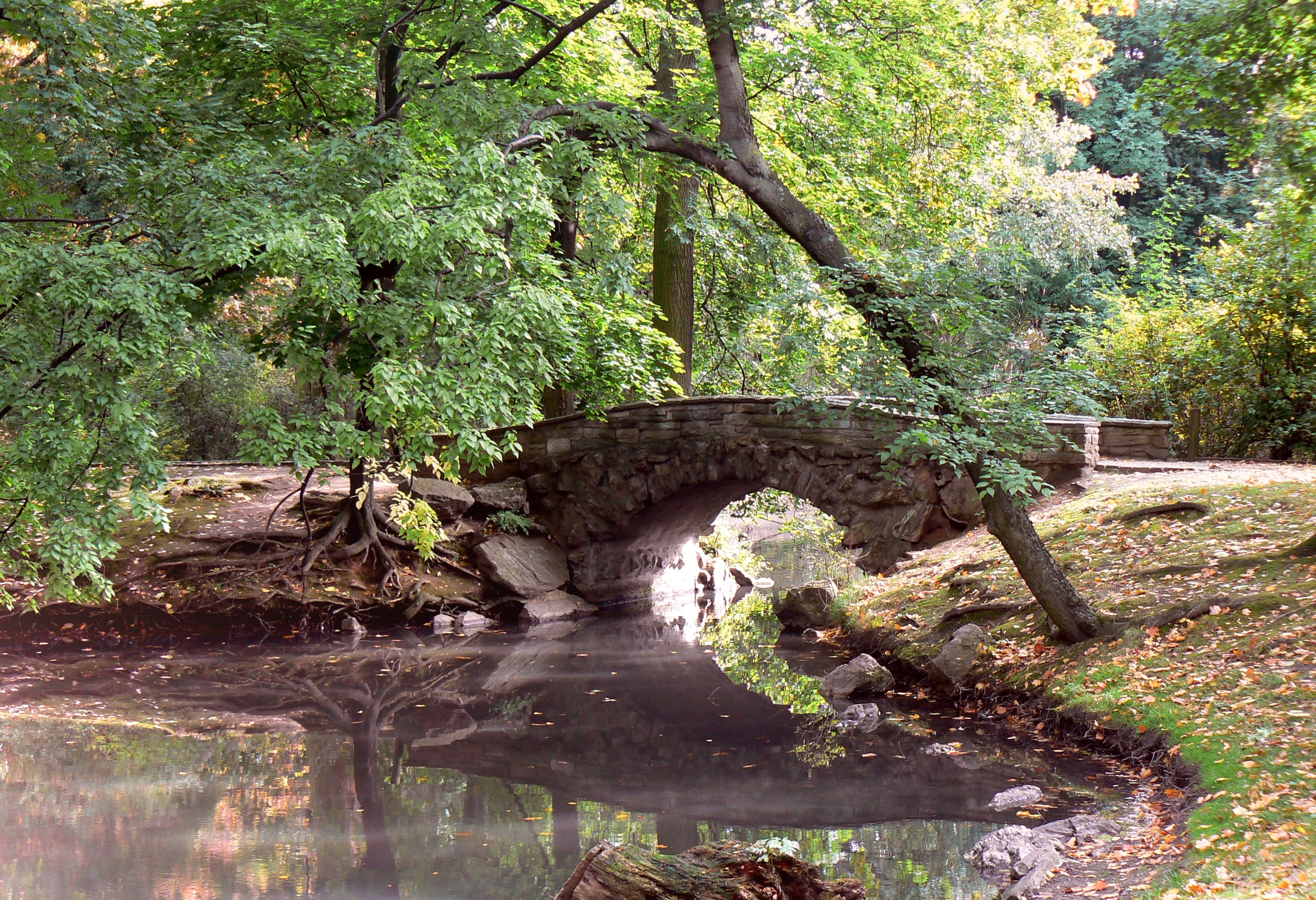 Frankfurt Bockenheim Parkbrücke im Bernus-Park